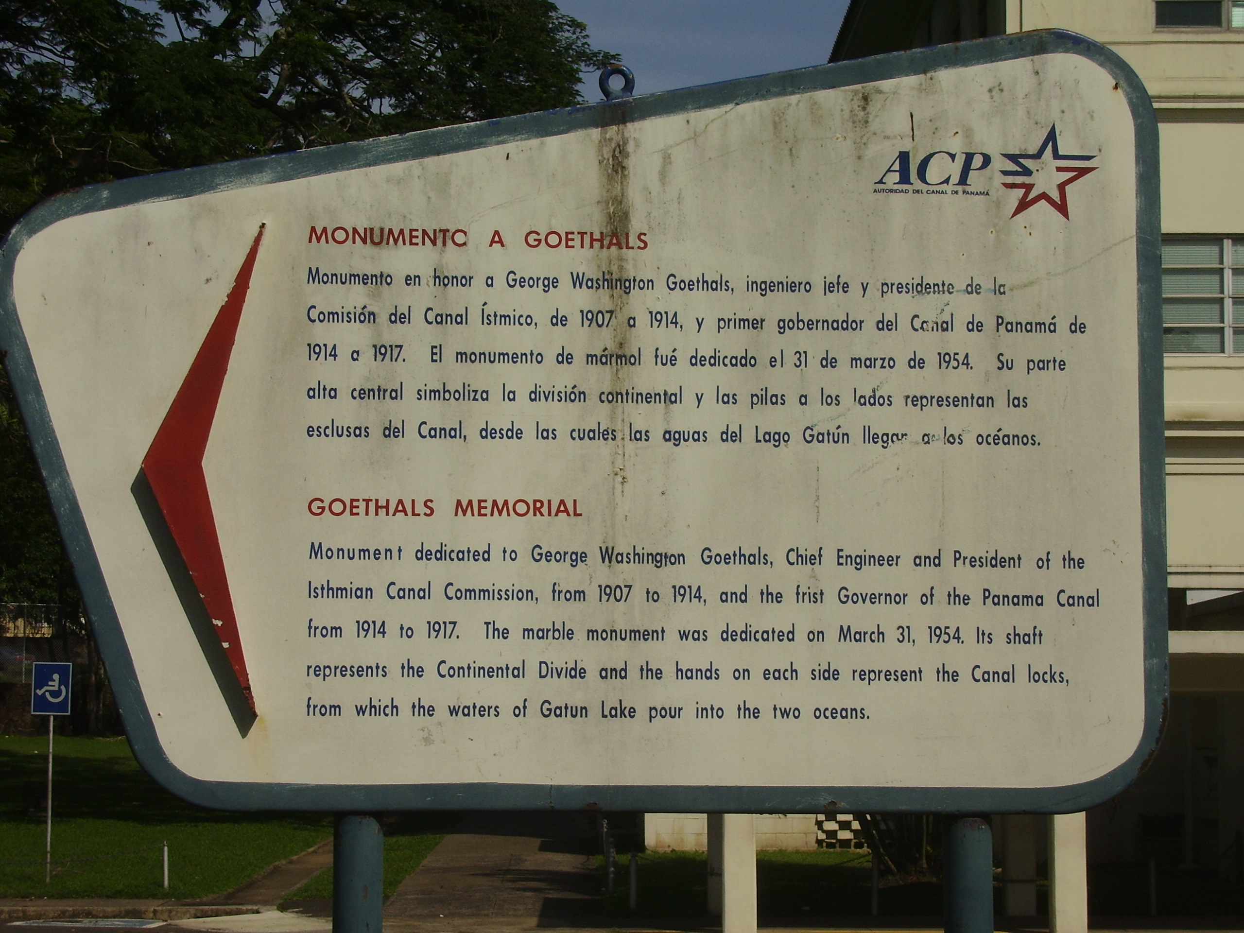 Información sobre el monumento a George Washington Goethals.